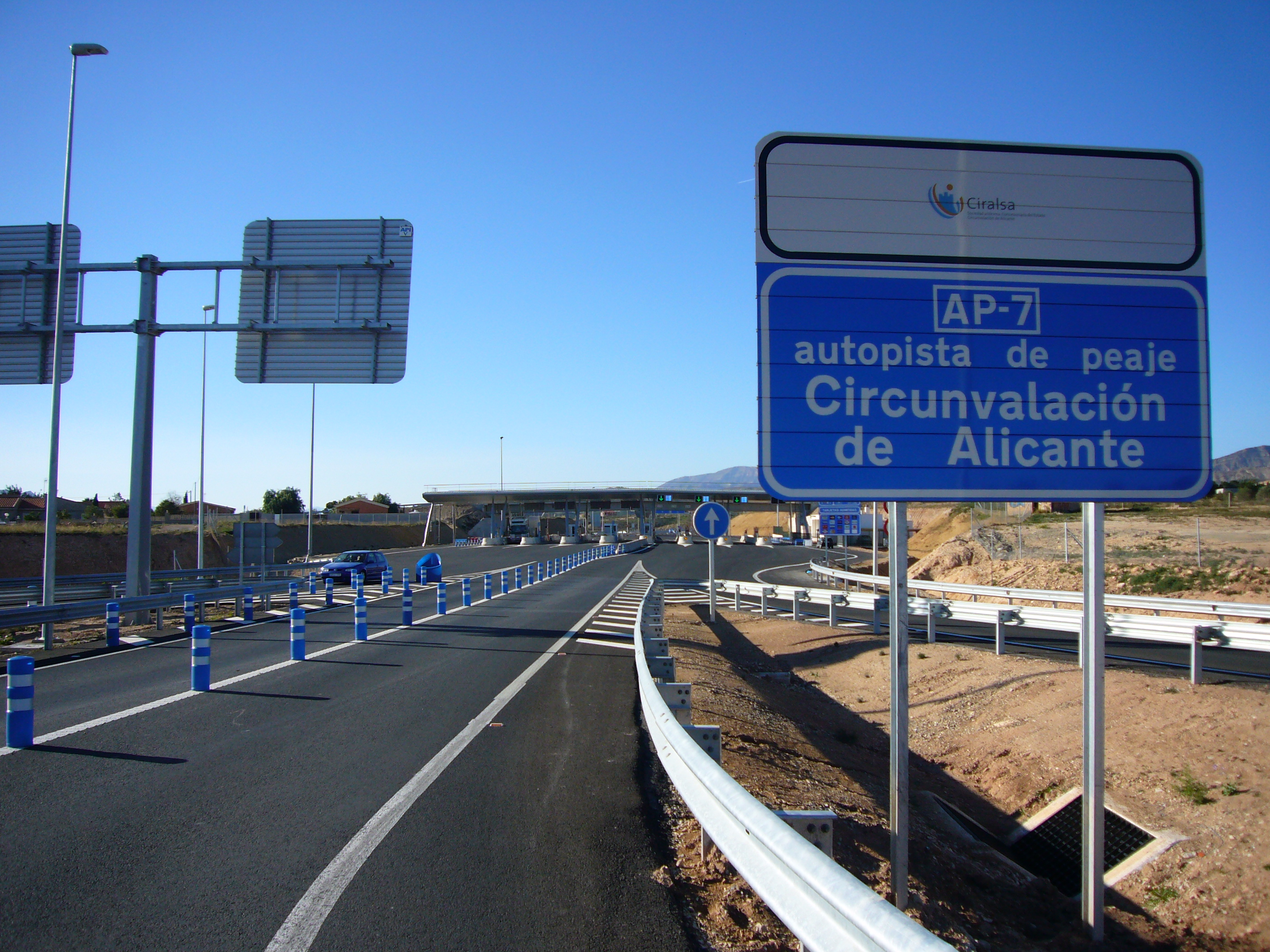 Estación de peaje de la autopista AP-7 de Sant Vicent del Raspeig (Alicante).